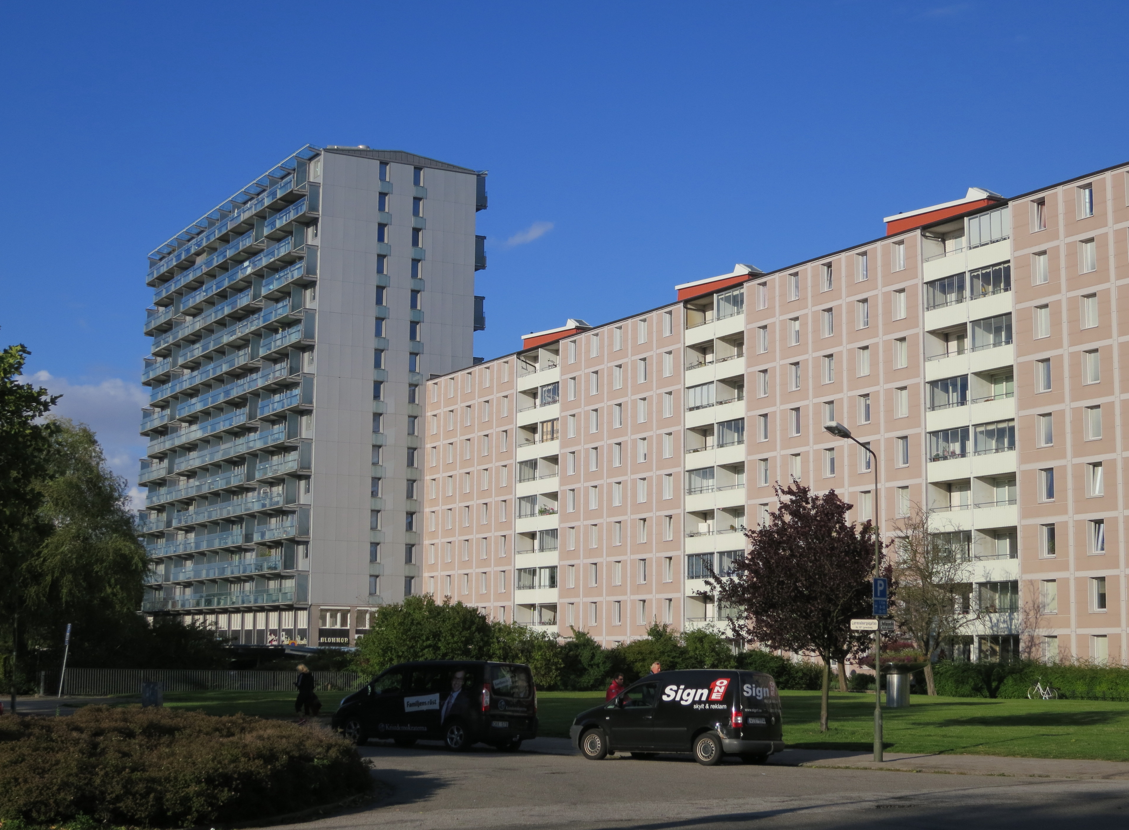 Bostadshus, Lorensborg